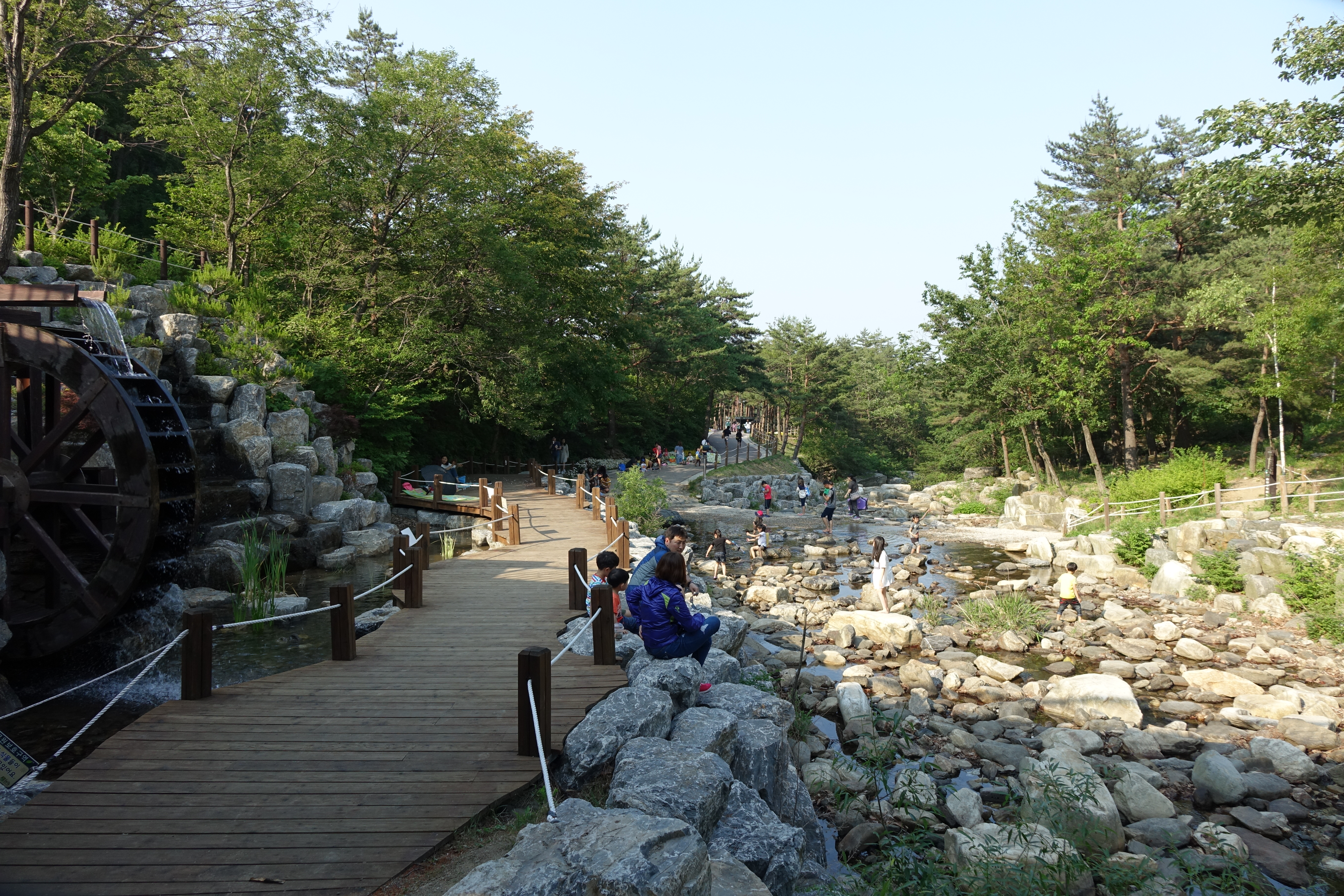 최광모 촬영 사진 (Photos taken by Choe Kwangmo)